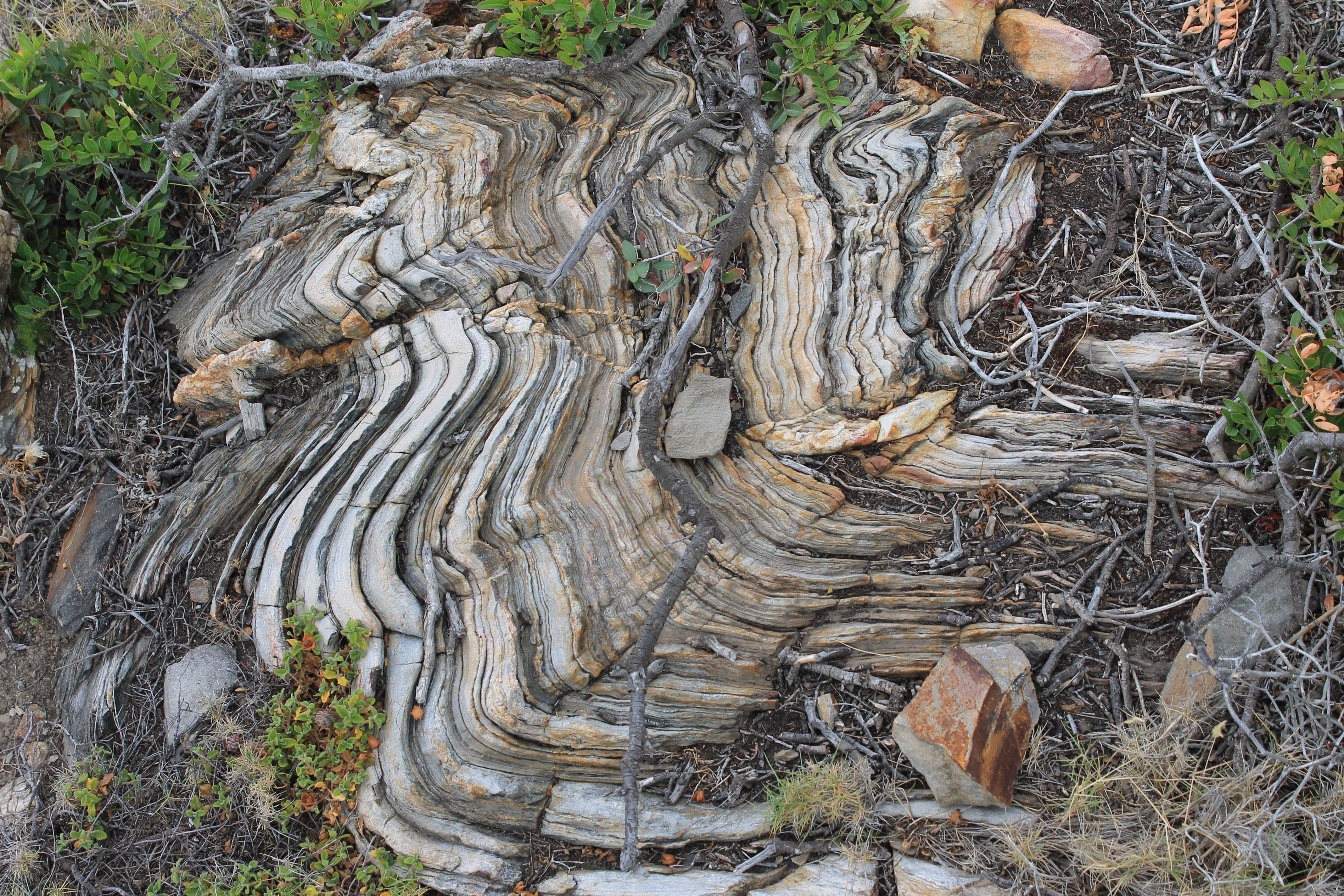 Geological formation, Spain, northeastern coast, Parc Cap de Creus (Quarzit mit migmatitischem Gefüge und einzelnen boudinierten Lagen)